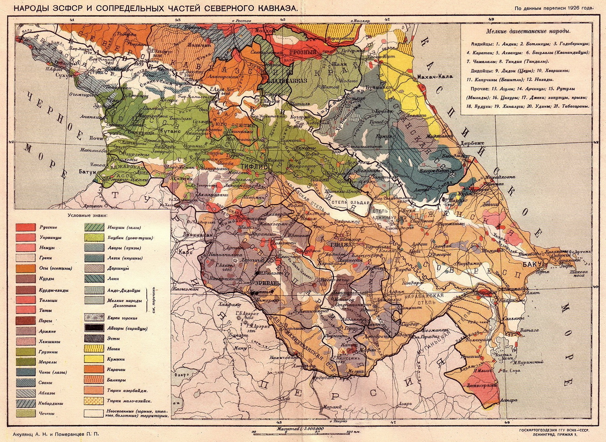 Народы ЗСФСР и сопредельных частей Северного Кавказа (1926). Масштаб 1: 3 000 000; Размеры: 26 × 36 см.